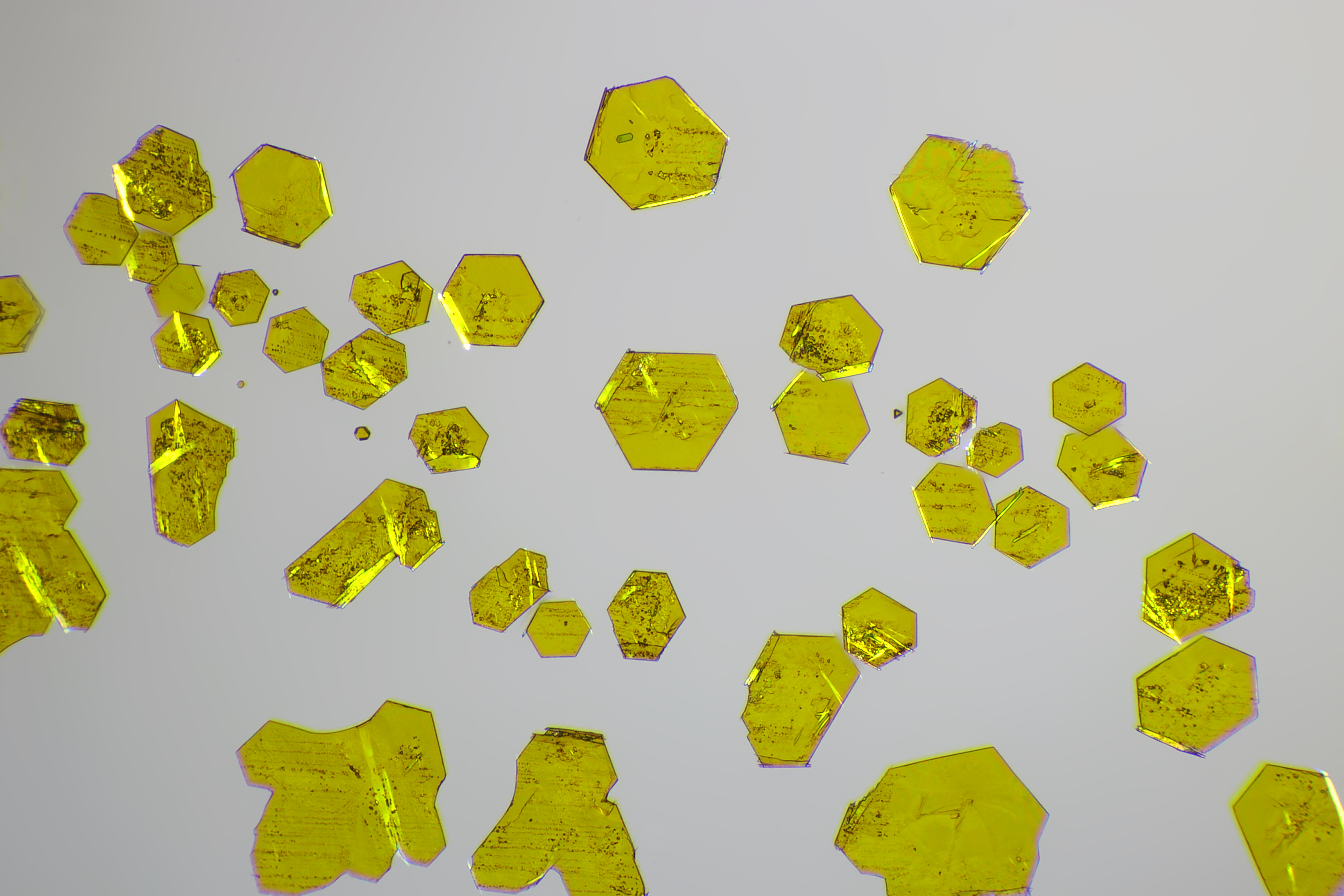 Blei(II)-iodid, gefällt, Mikrofoto, 16er Objektiv, Polarisationskontrast